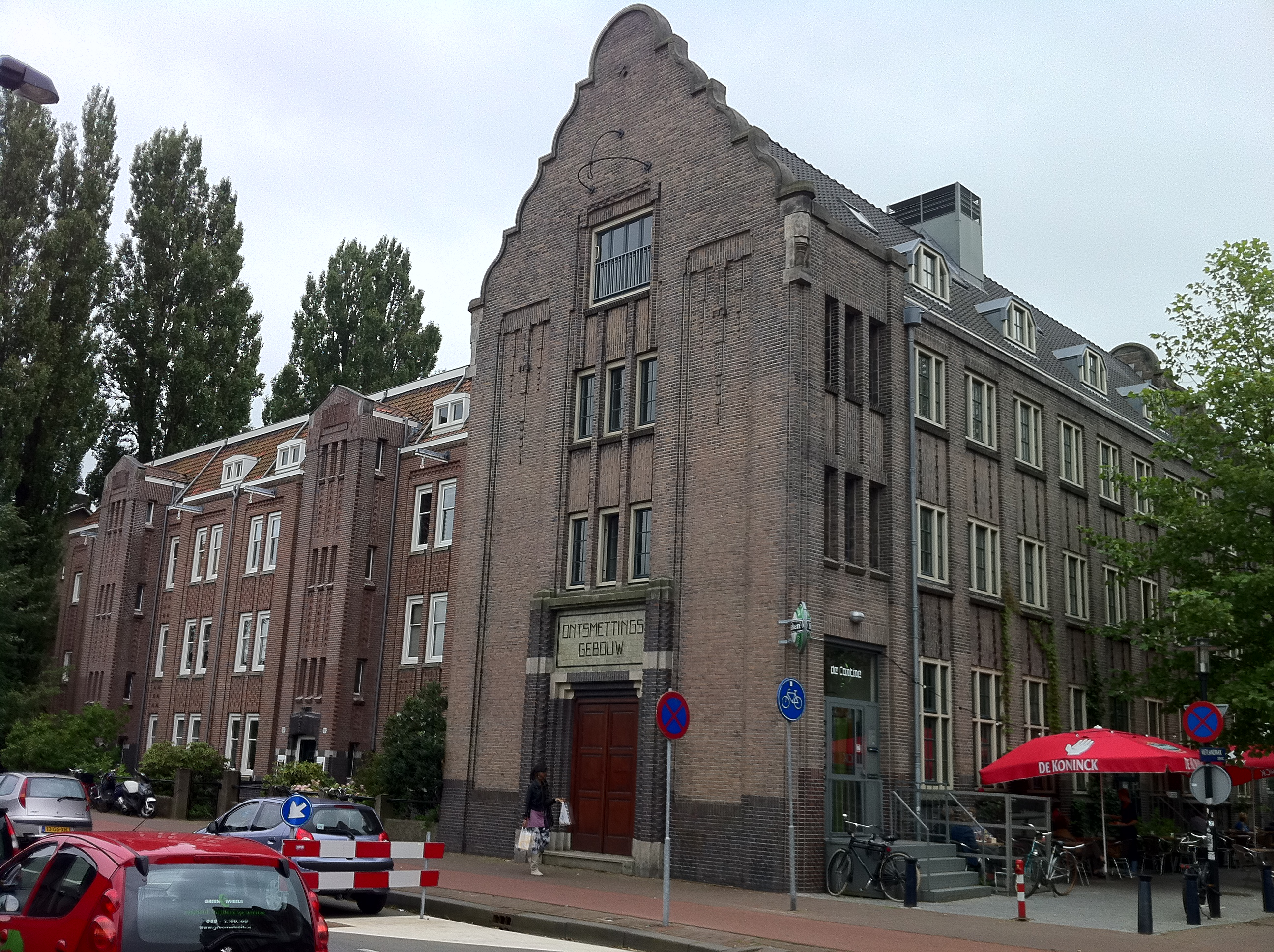 Lloydcomplex Ontsmettingsgebouw Oostelijke Handelskade Amsterdam